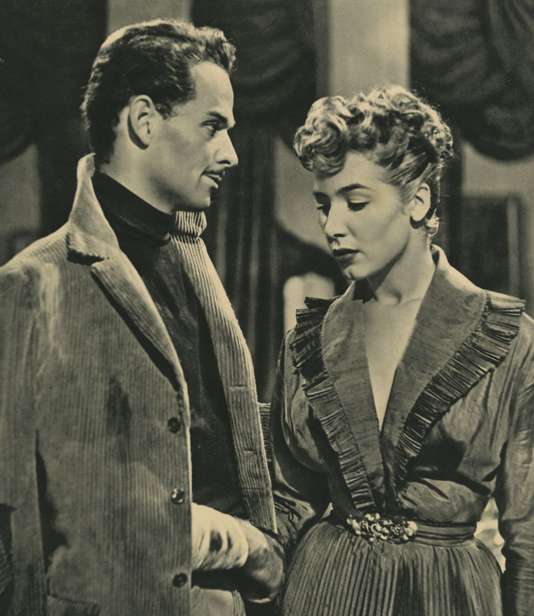 Frank Latimore e Cosetta Greco nel film La nemica 1950